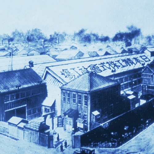 First NSK plant in Japan